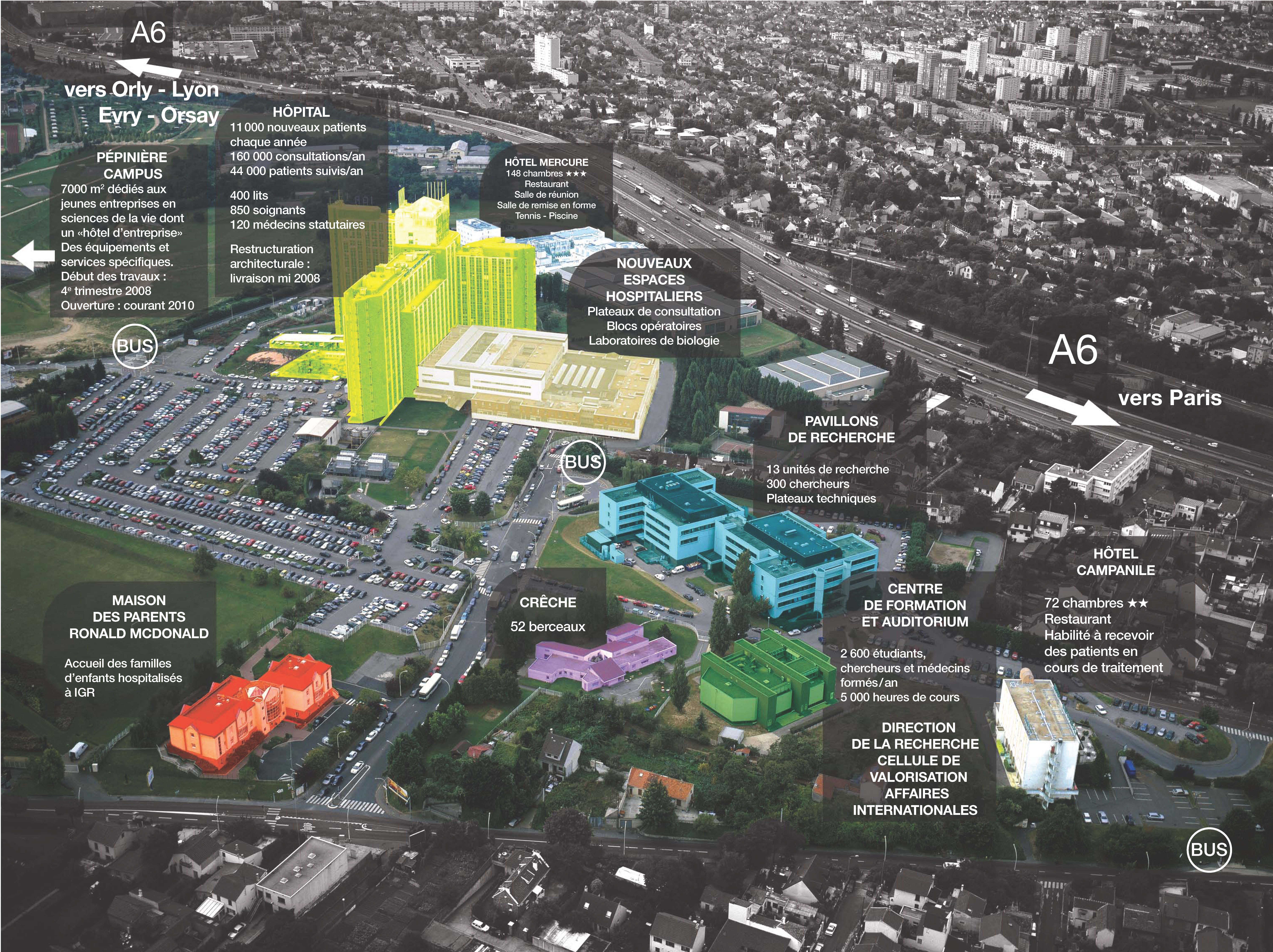 Cancer Campus vue aérienne du bio cluster